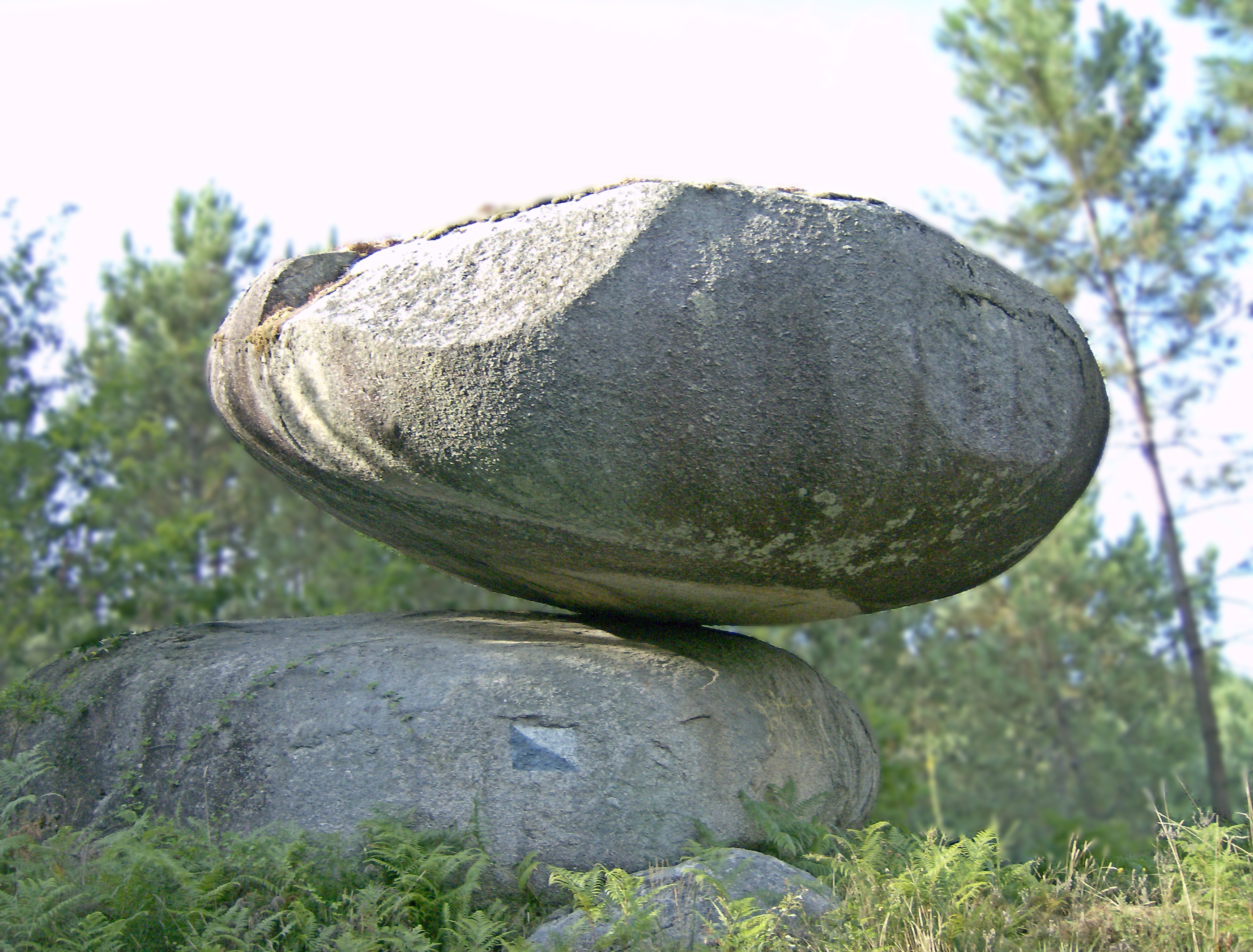 Pena do Equilibrio, Ponteareas.